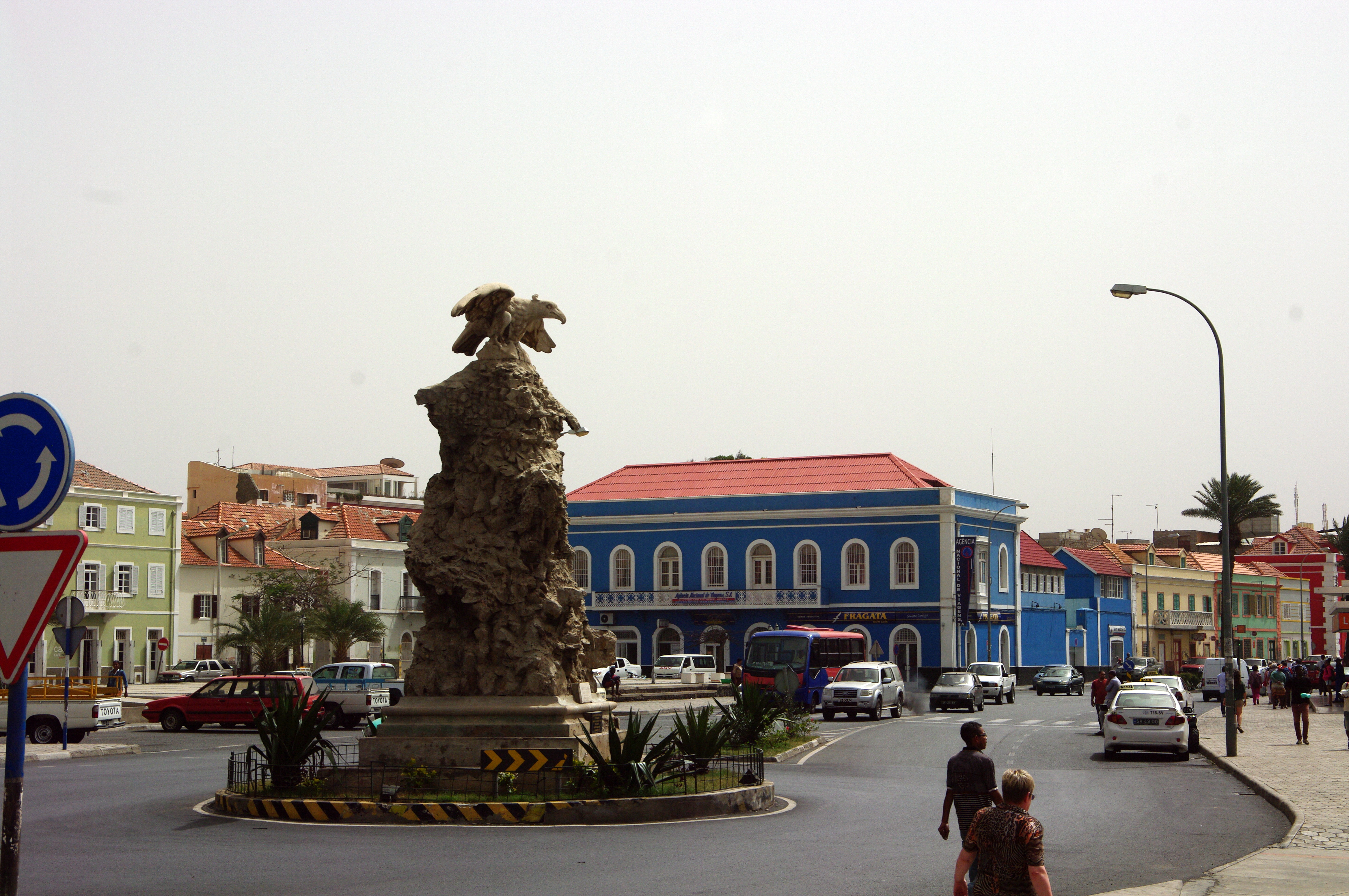 Mindelo Uferstraße